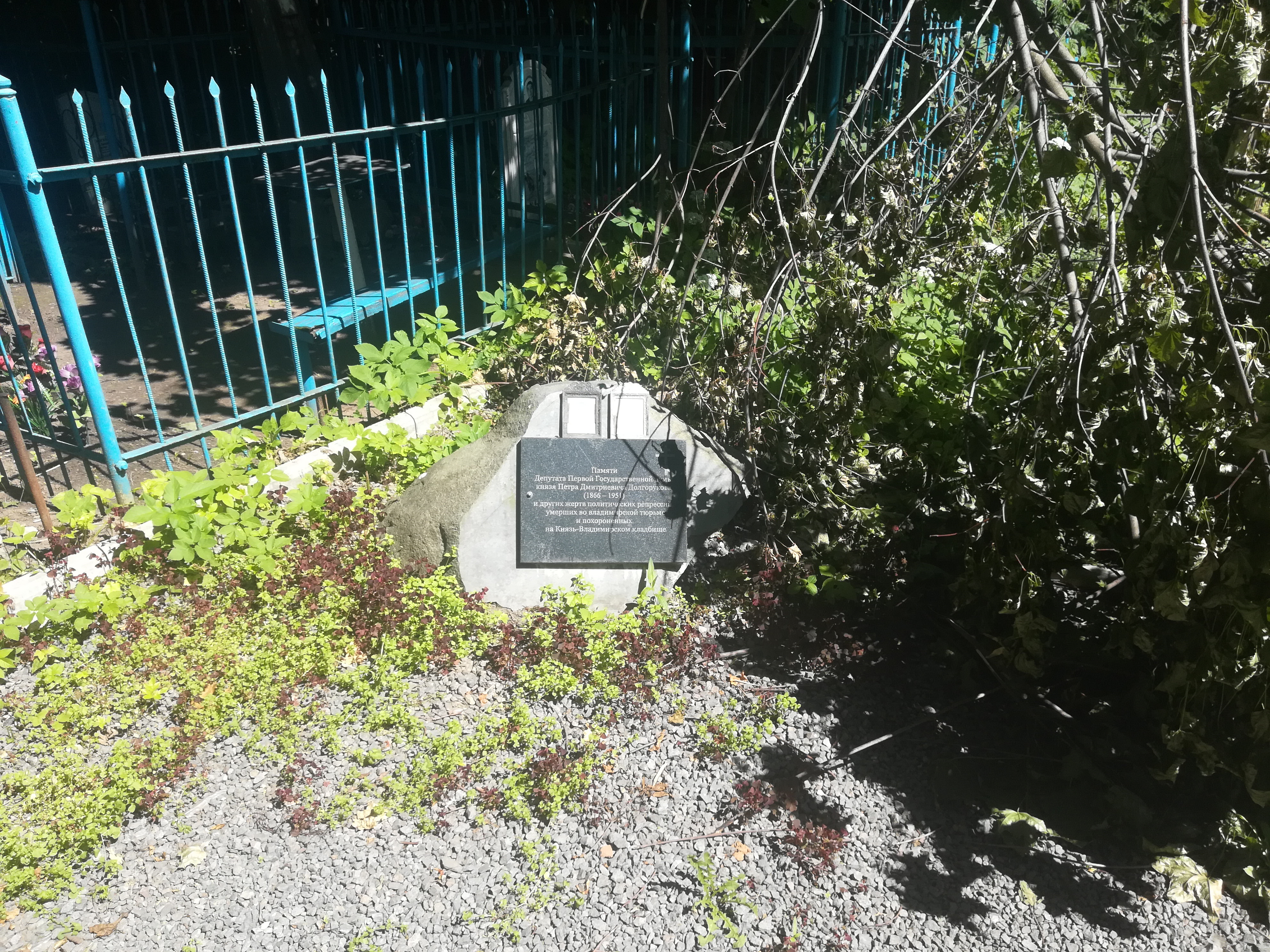 Владимир